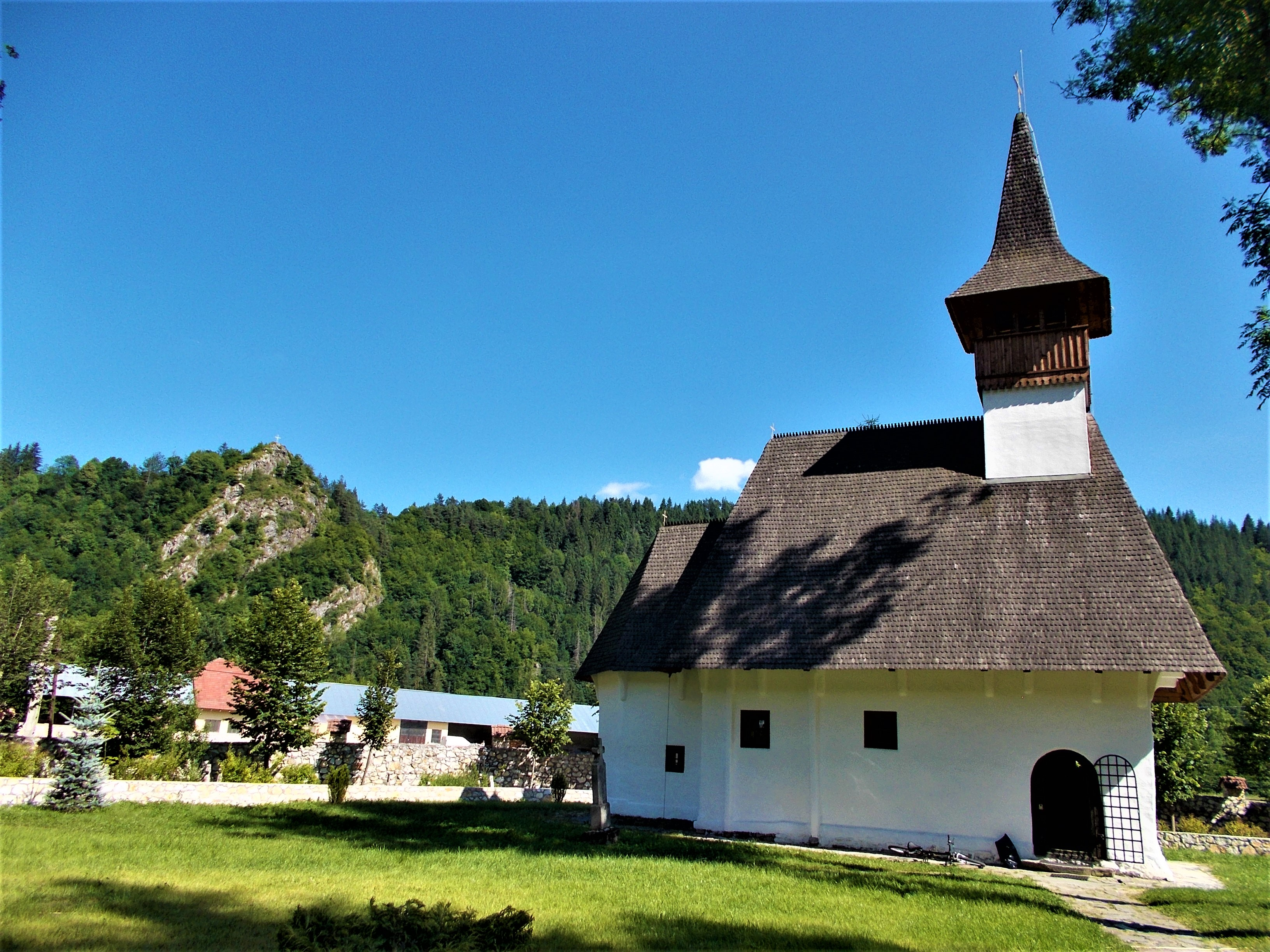 Biserica de lemn "Sfântul Mare Ierarh Nicolae" a mănăstirii Lupşa, județul Alba